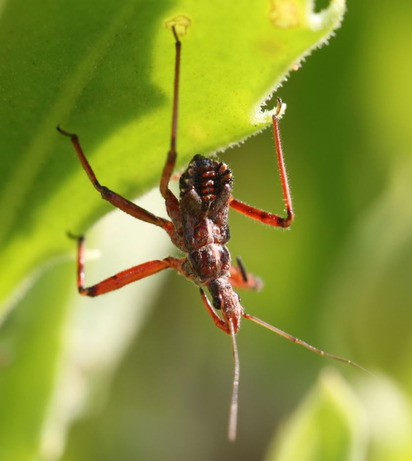 Nymphe von Rhynocoris erythropus am 3. Juli 2018 an der Côte d’Azur